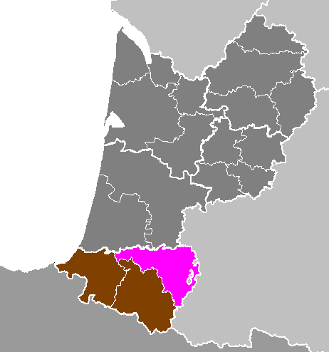 Maps of arrondissements and cantons of France: Département des Pyrénées-Atlantiques - Arrondissement de Pau.PNG (Région Aquitaine)